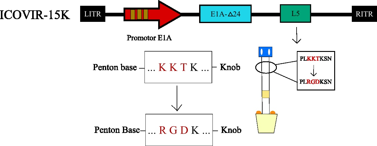 El ICO15K presenta varias modificaciones en su genoma. La mutación en el shaft de la fibra, que consiste en la sustitución del motivo KKT por un dominio RGD, permite que el Ad en sangre no interactúe con los heparán sulfato presentes en células hepáticas. El objetivo de dicho cambio era aumentar la focalización antitumoral.